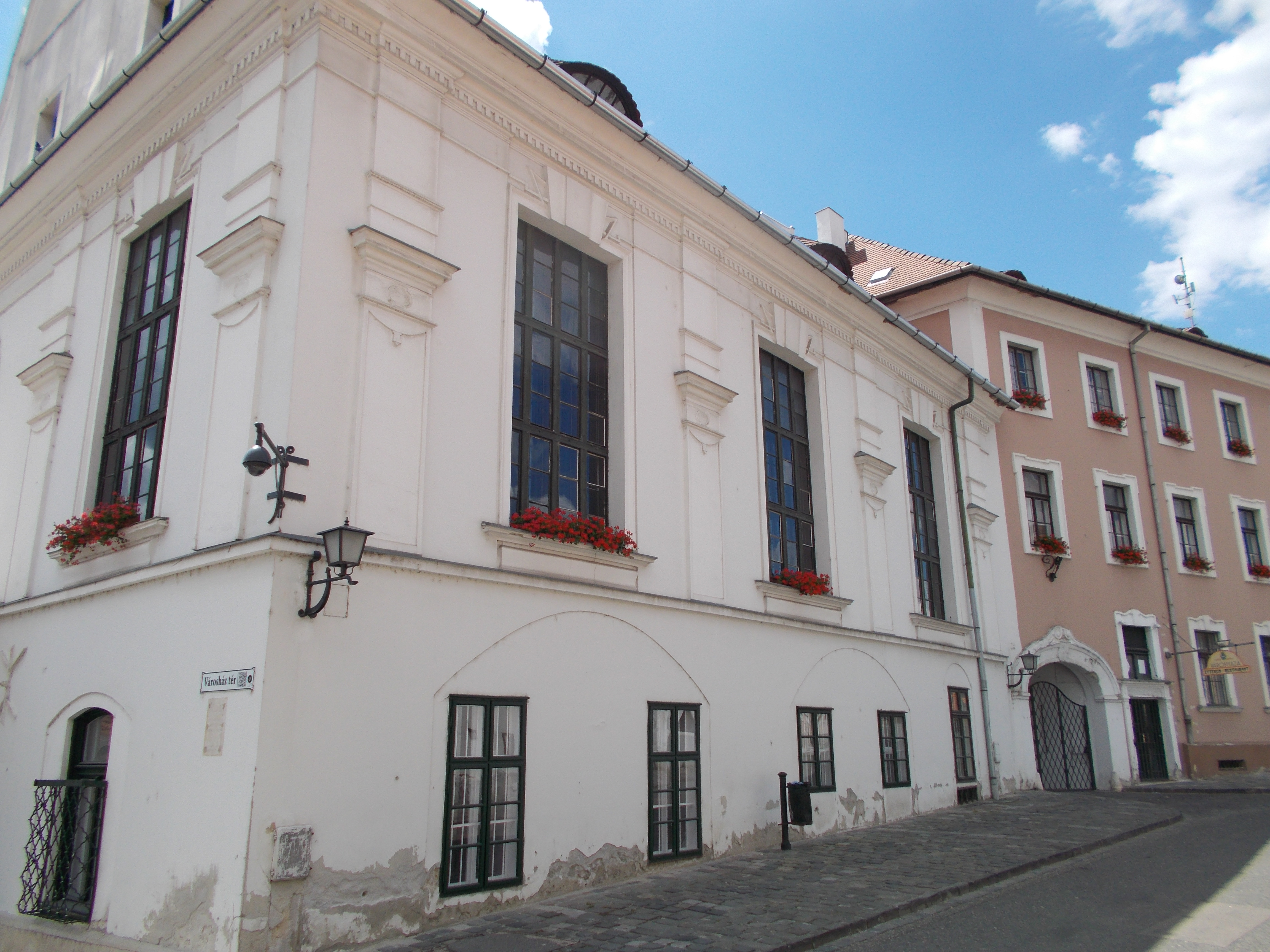 Kétemeletes lakóépület. Műemlék ID 3822. Városháza (balra) Bajcsy Zsilinszky utcai homlokzata 12 tengelyes. Műemlék ID 7402 - Szentendre, Rákóczi Ferenc utca 2 This is a photo of a monument in Hungary, Identifier: 3822 This is a photo of a monument in Hungary, Identifier: 7402